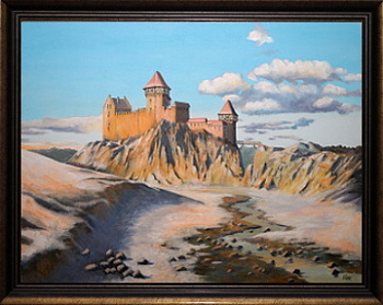 Hrad Buben, olej na plátně 94x72 cm